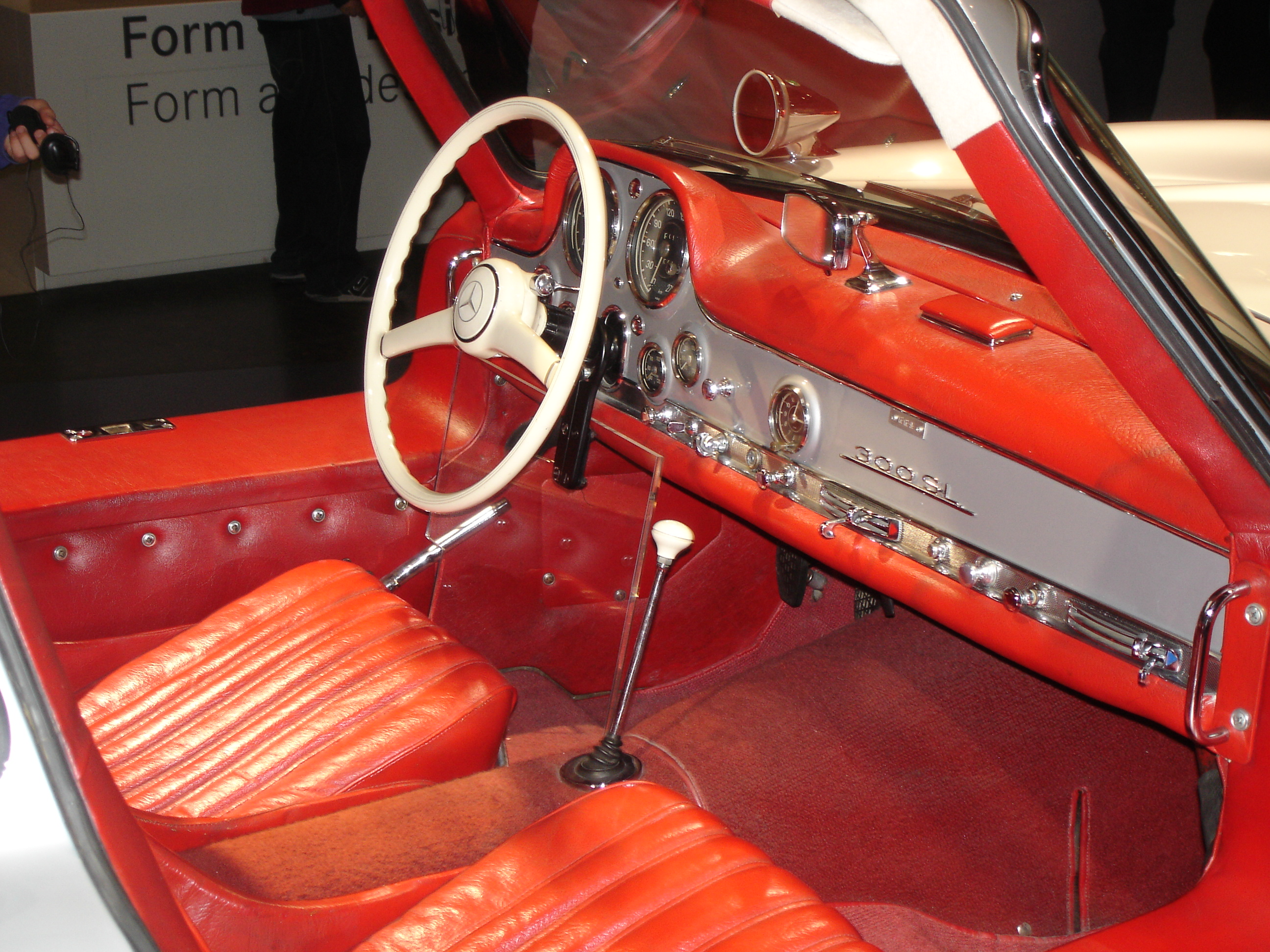 Innenraum des 300 SL (stuttgarter Mercedes-Benz-Museum)